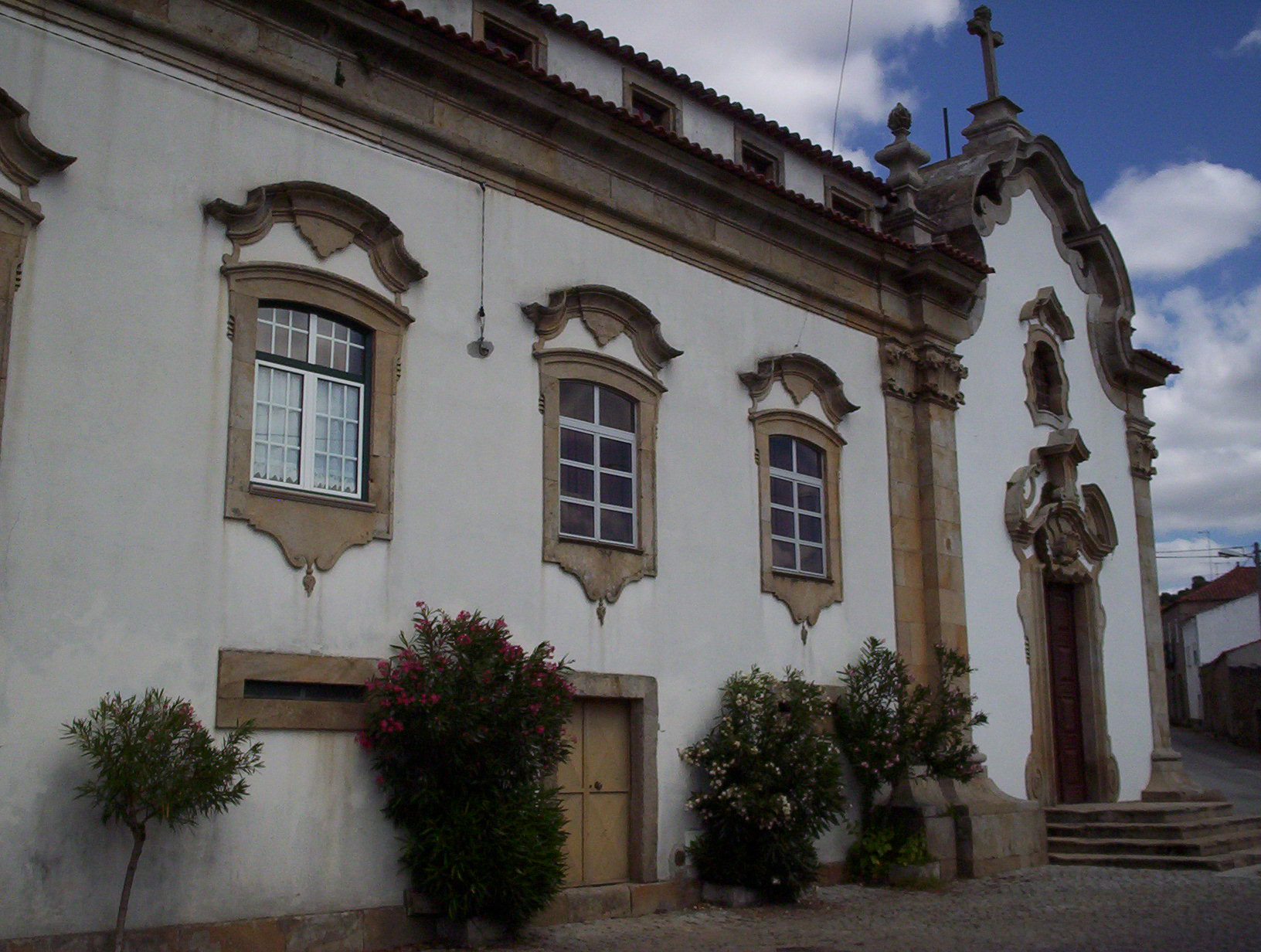 Igreja Matriz de Santa Eufémia, Pinhel